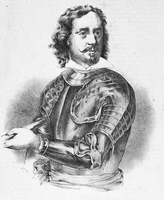 Литография с изображением Педро Фахардо-де-Суньига-и-Рекесенс-и-Пиментель (1602-1647), гранда Испании, вице-короля Сицилии.